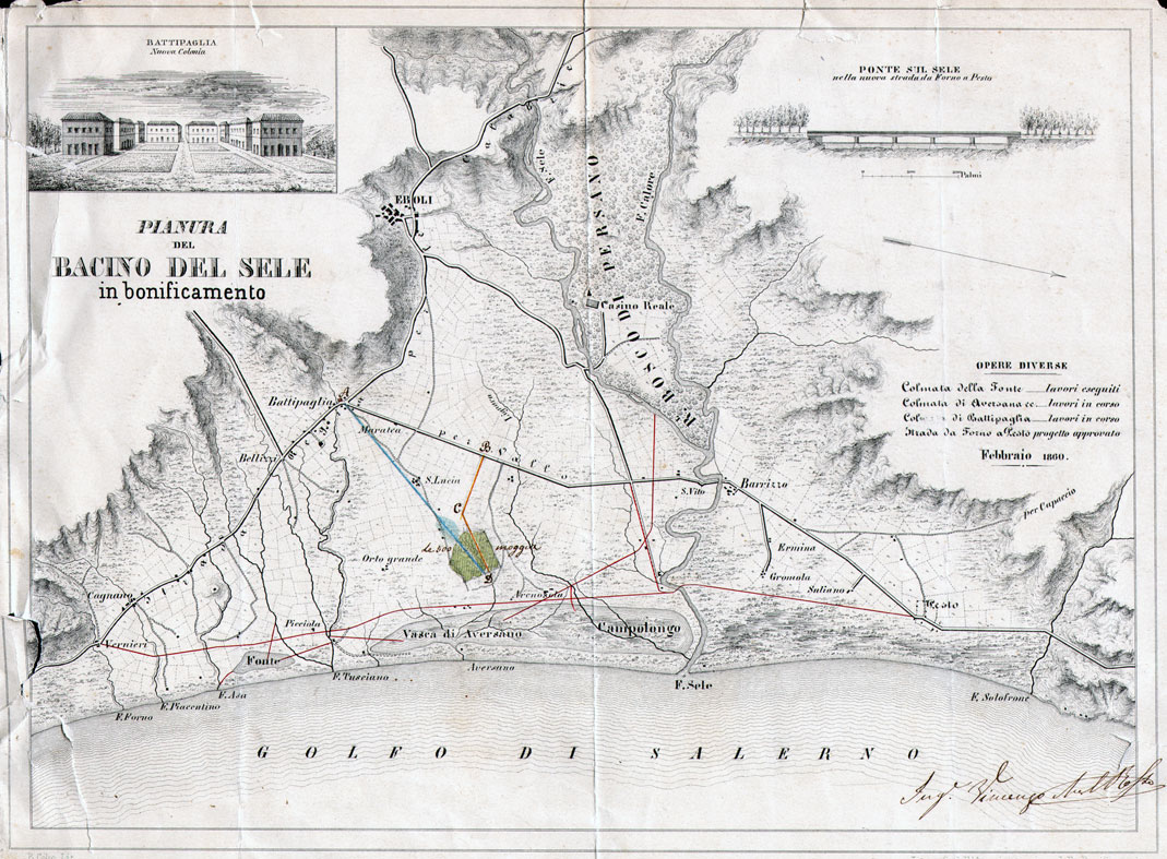 Pianta della pianura del bacino del Sele in bonificamento.Litografia dell’Amministrazione delle Bonificazioni con il prospetto della nuova colonia e della strada che porta alle terre demaniali da dividere e assegnare ai coloni.La pianta mostra in alto a destra il ponte sul Sele nella nuova strada da Sarno a Paestum. Sullo stesso lato, vengono citate opere diverse come Colmata della Fonte, Colmata di Aversana e Colmata di Battipaglia. Si notano molte strade tra cui la Strada che porta da Sarno a Paestum. In alto a sinistra è presentato il Prospetto comprese di Battipaglia. La pianta comprende diverse località: Cagnano (Pontecagnano), Bellizzi, Battipaglia, Eboli, la strada delle Calabrie,il bosco di Persano, in cui vi è la Casina Reale, Barrizzo (Ponte Barizzo), Capaccio, Gromola, Campolongo, Vasca di Aversano, Fonte, Picciola, Orto Grande, Maratea, S. Lucia, S. Vito. Sono presenti diversi fiumi, che sfociano nel golfo di Salerno, tra cui il Piacentino (Picentino),il Tusciano,l'Aversano, il Sele, il Solofrone. Quasi al centro della cartina vi sono le 500 moggia, territori assegnati alle famiglie che venivano ad abitare nella nuova colonia di Battipaglia. Questa pianta si trova nell'Archivio di Stato di Salerno nella categoria del Genio civile, busta 135, fascicolo 248.